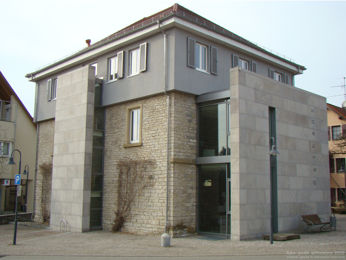 Rathaus in Jagsthausen